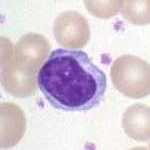 Lymphocyte